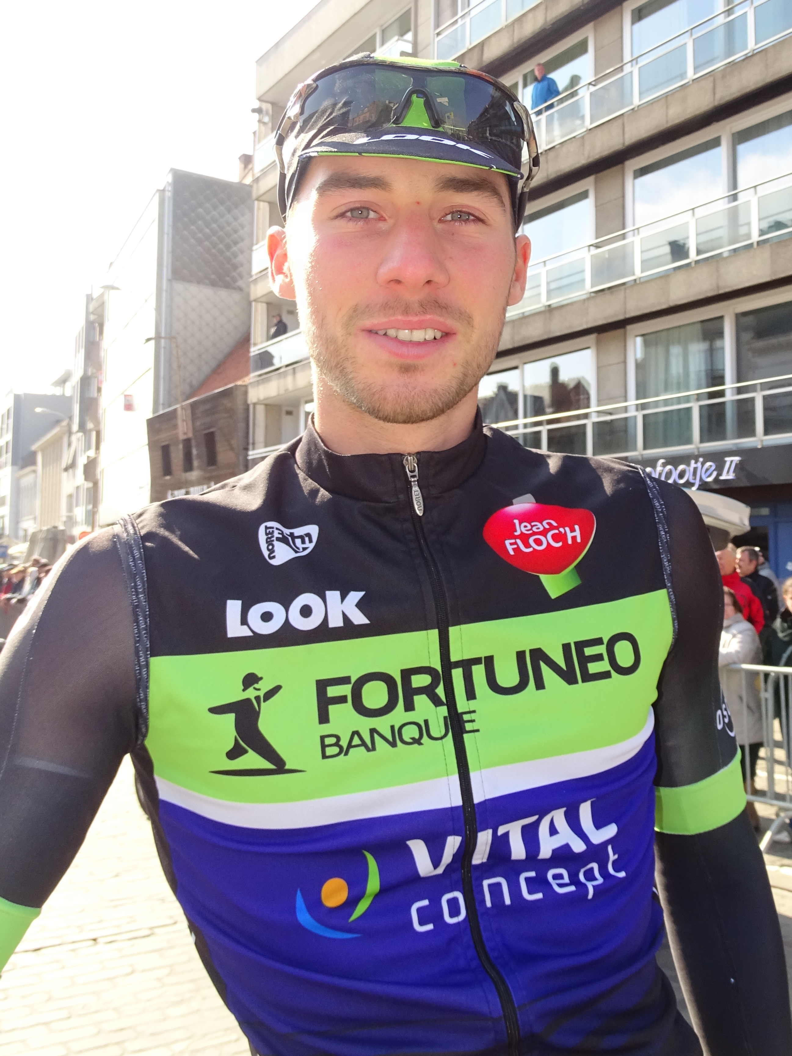 Reportage réalisé le mercredi 16 mars à l'occasion du départ de la Nokere Koerse 2016 à Deinze, Belgique.